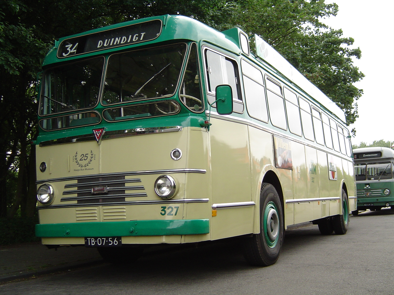 HTM Kromhout Bus 327 van het Haags Bus Museum (